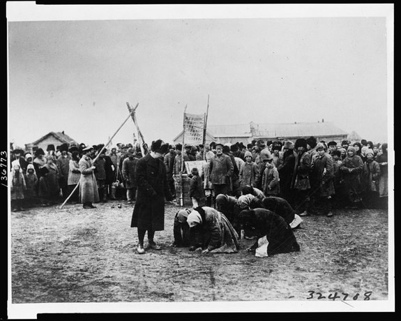 Женщины благодарят представителей Американской администрации помощи. Деревня Васильевка Самарской губернии.(предположительно) ARA (American Relief Administration) - Американская администрация помощи - официально негосударственная организация США, занимавшаяся продовольственной помощью в Европе и России после Первой мировой войны. Во время наибольшего расцвета организация кормила ежедневно до 10 с половиной миллионов человек. Существовала с 1919 до конца 1930-х гг.